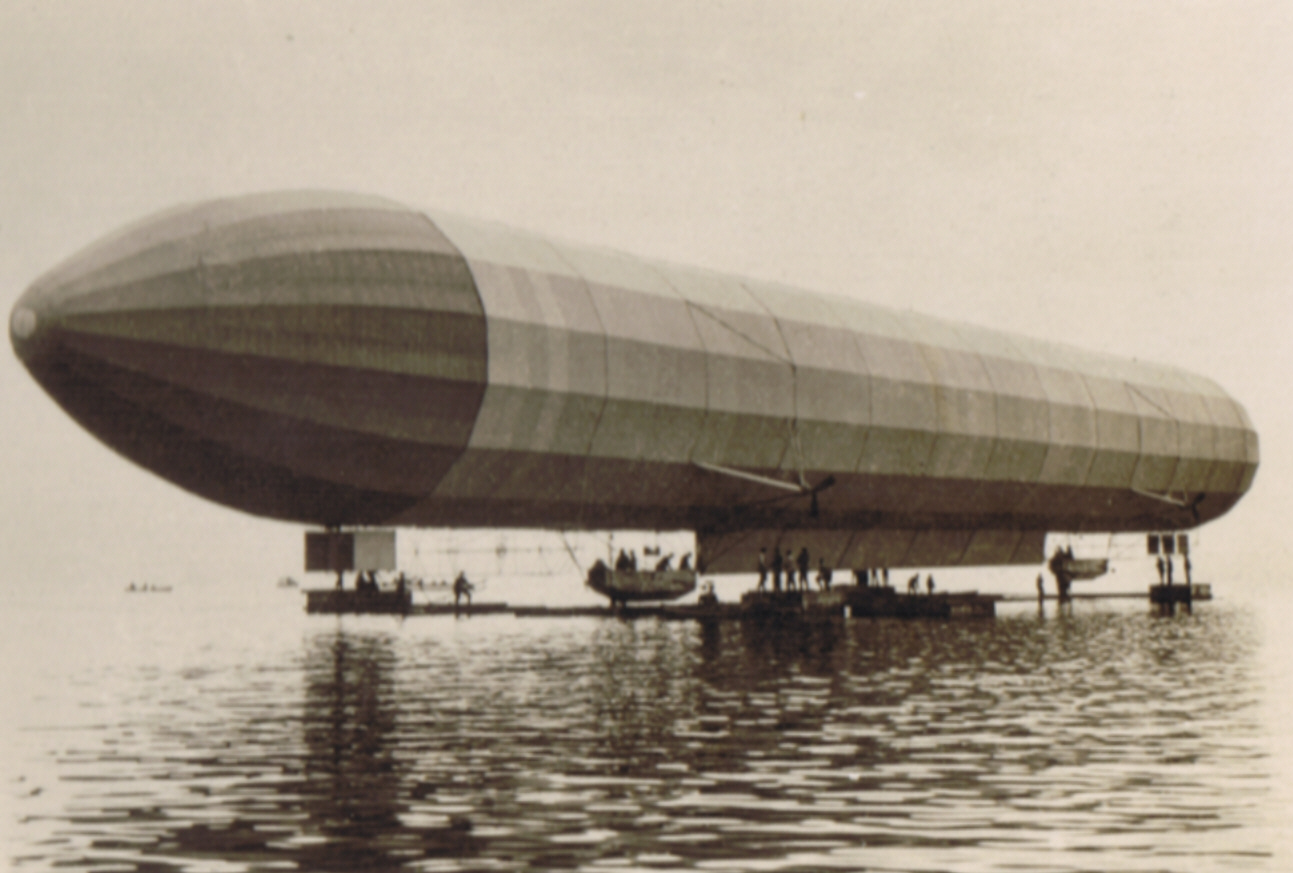 LZ 2 im Jahr 1905